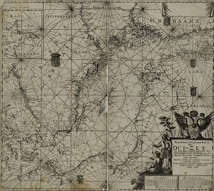 Läänemeremaade kaart